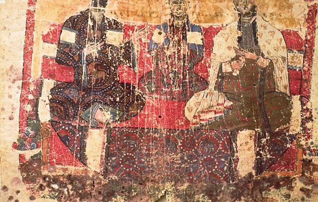 Գագիկ Կարսեցի